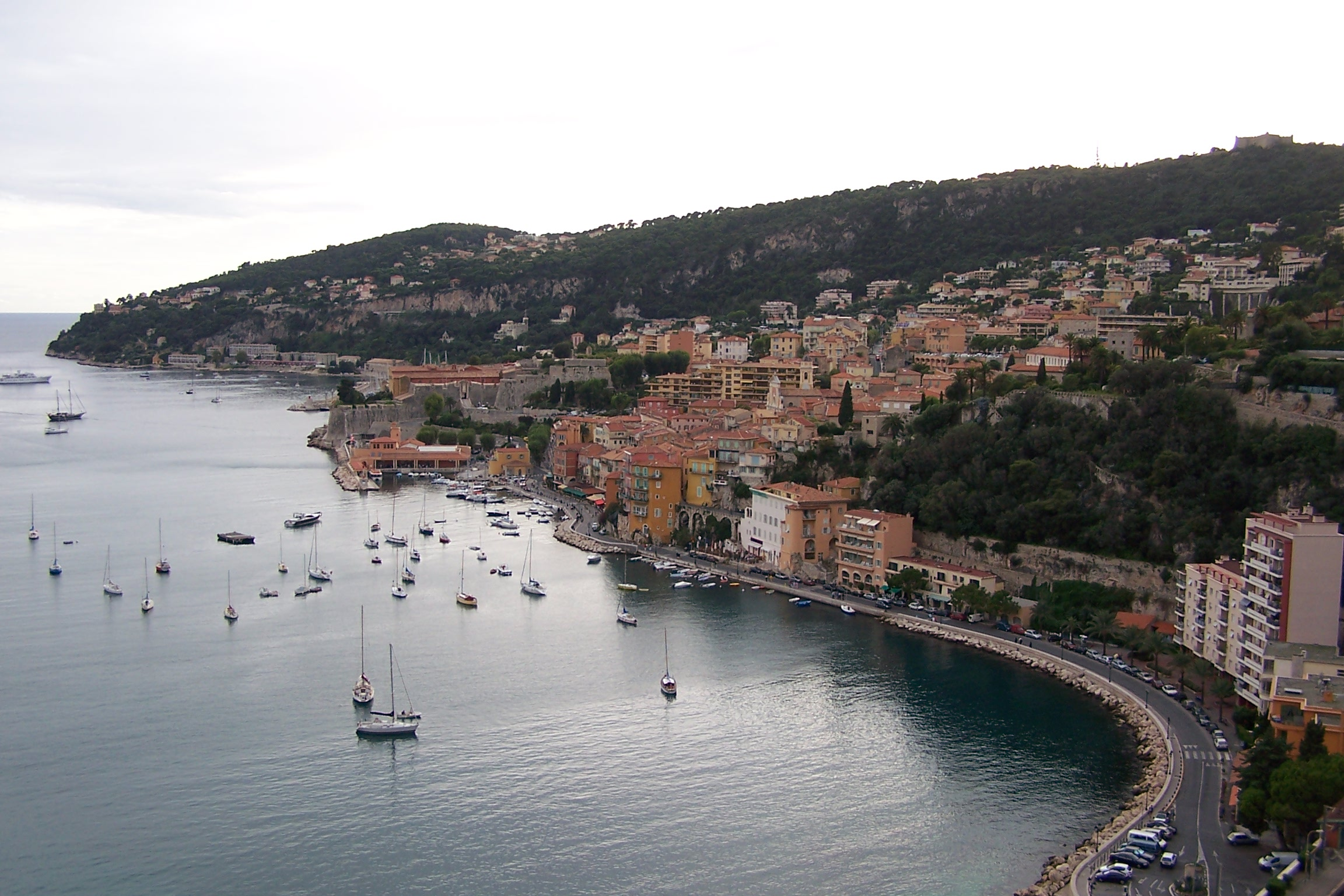 Villefranche_sur_Mer